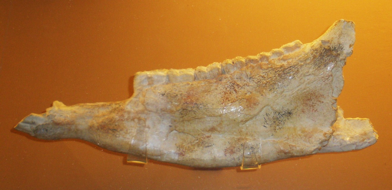 Fossil of Hipparion, an extinct mammal- Took the picture at Museo di Paleontologia di Firenze